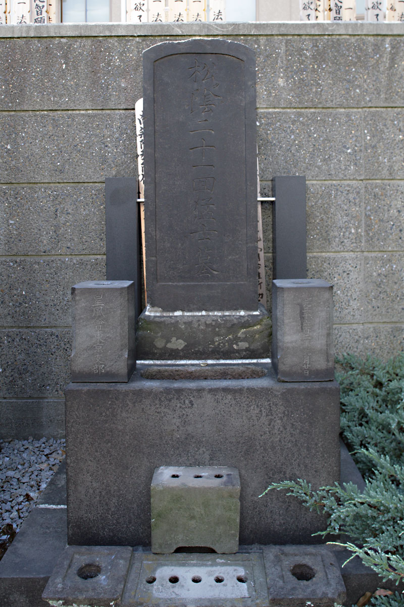 回向院（東京都 荒川区 南千住 5-33-13）にある吉田 松陰の墓